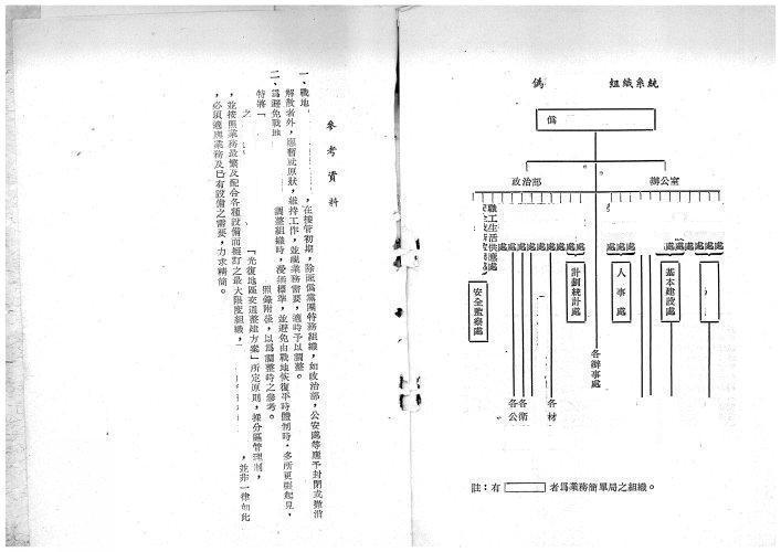 1955年 光復大陸設計委員會的成立文件